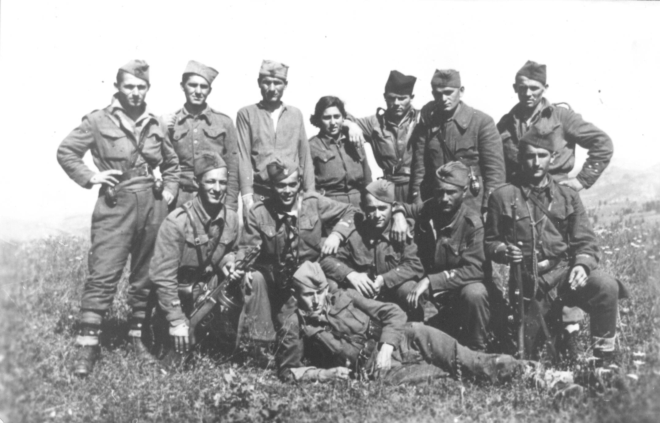 Partigiani della Terza brigata proletaria d'assalto del Sangiaccato nell'estate 1944